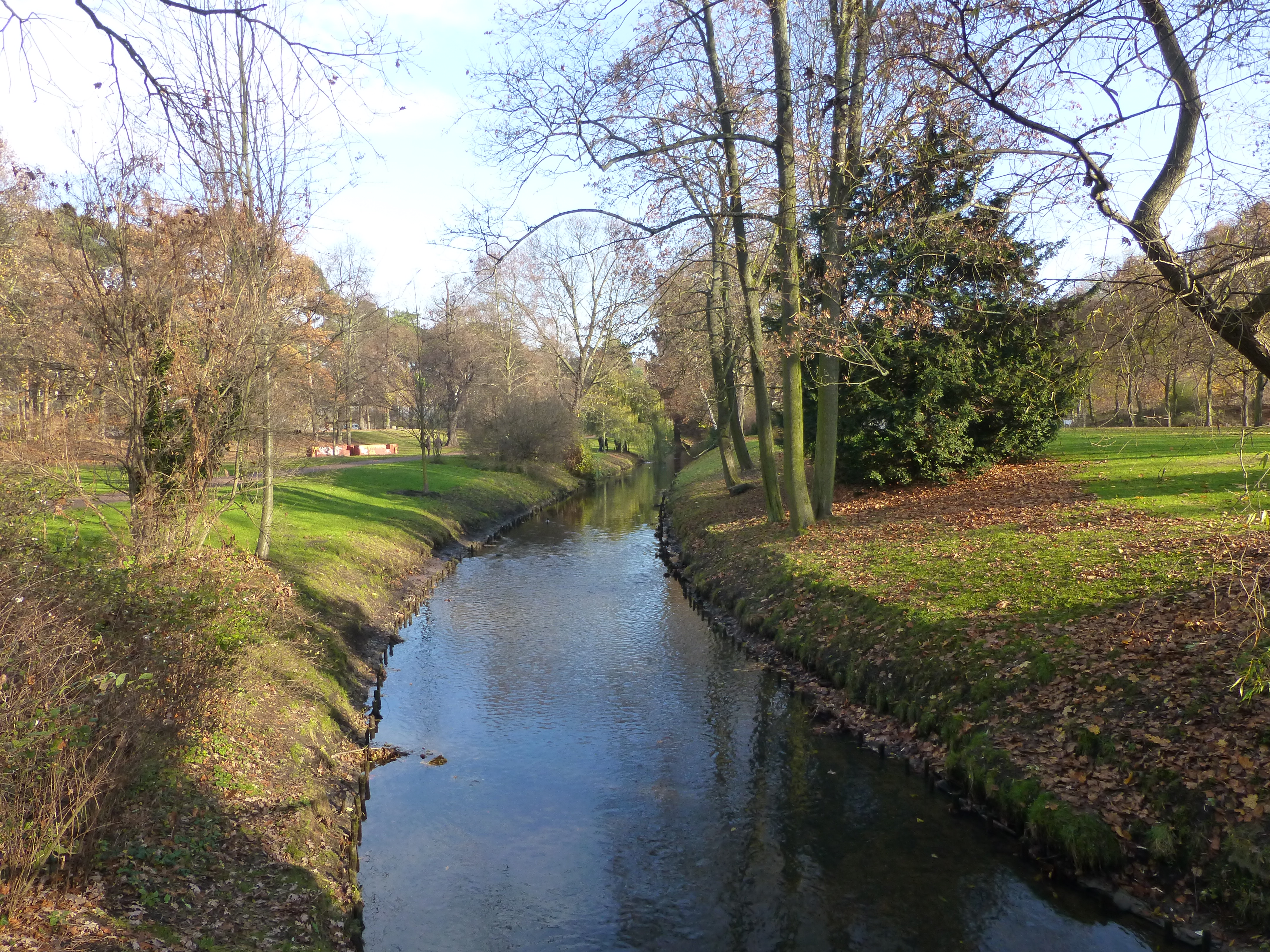 Berlin-Pankow : la Panke au Bürgerpark.